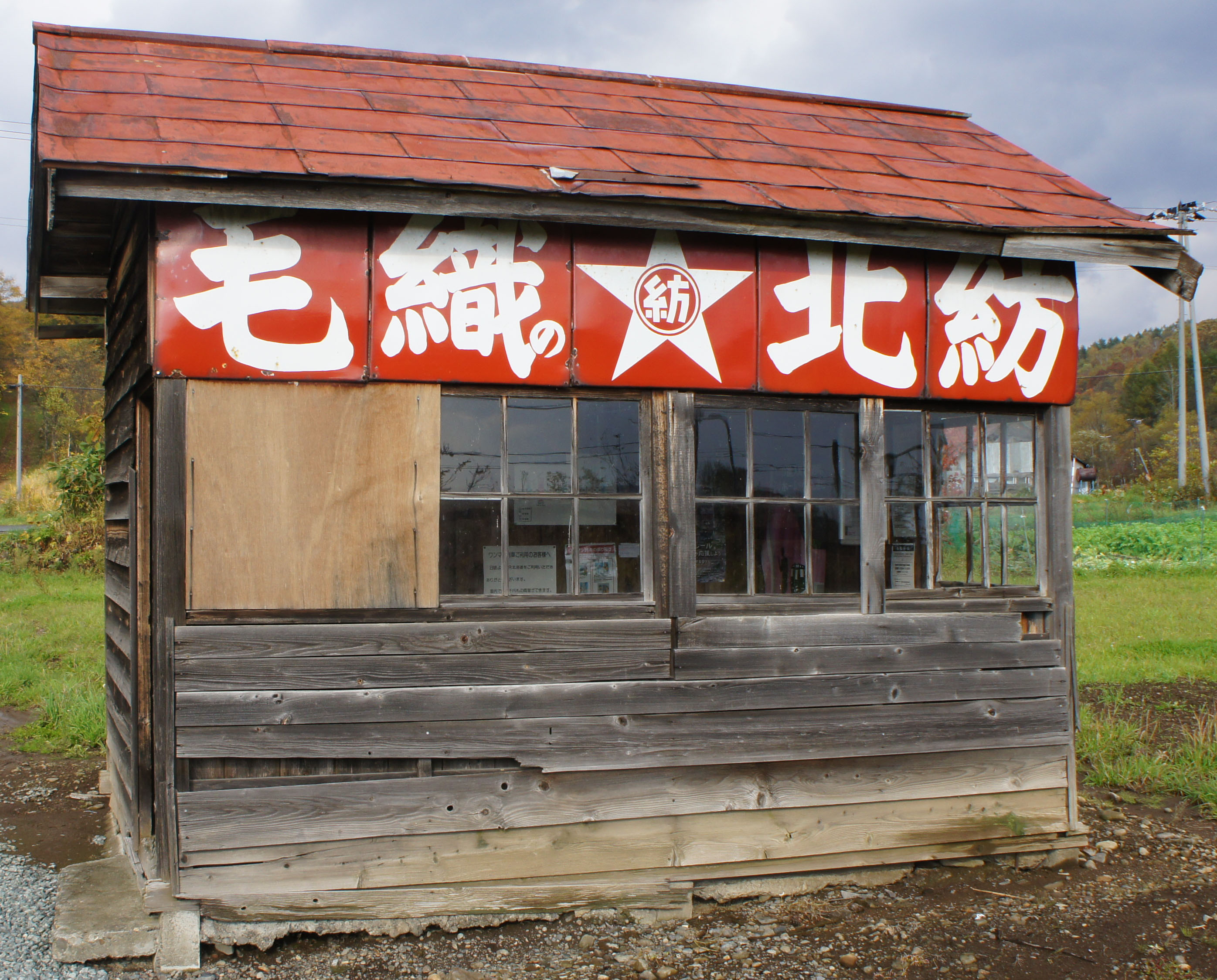 JR宗谷本線・北星駅の駅舎 Sony NEX-3